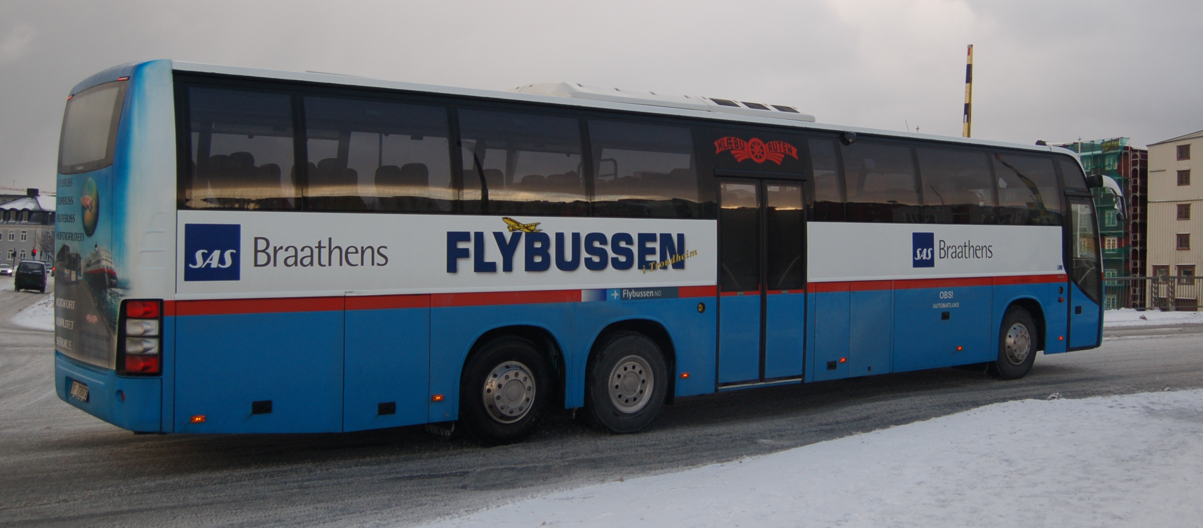 A Klæburuten Airport Bus in Trondheim, Norway.